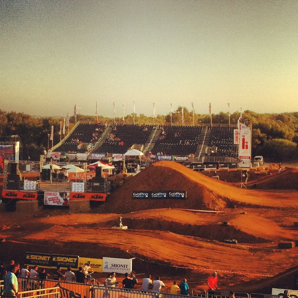 מסלול מוטוקרוס בישראל